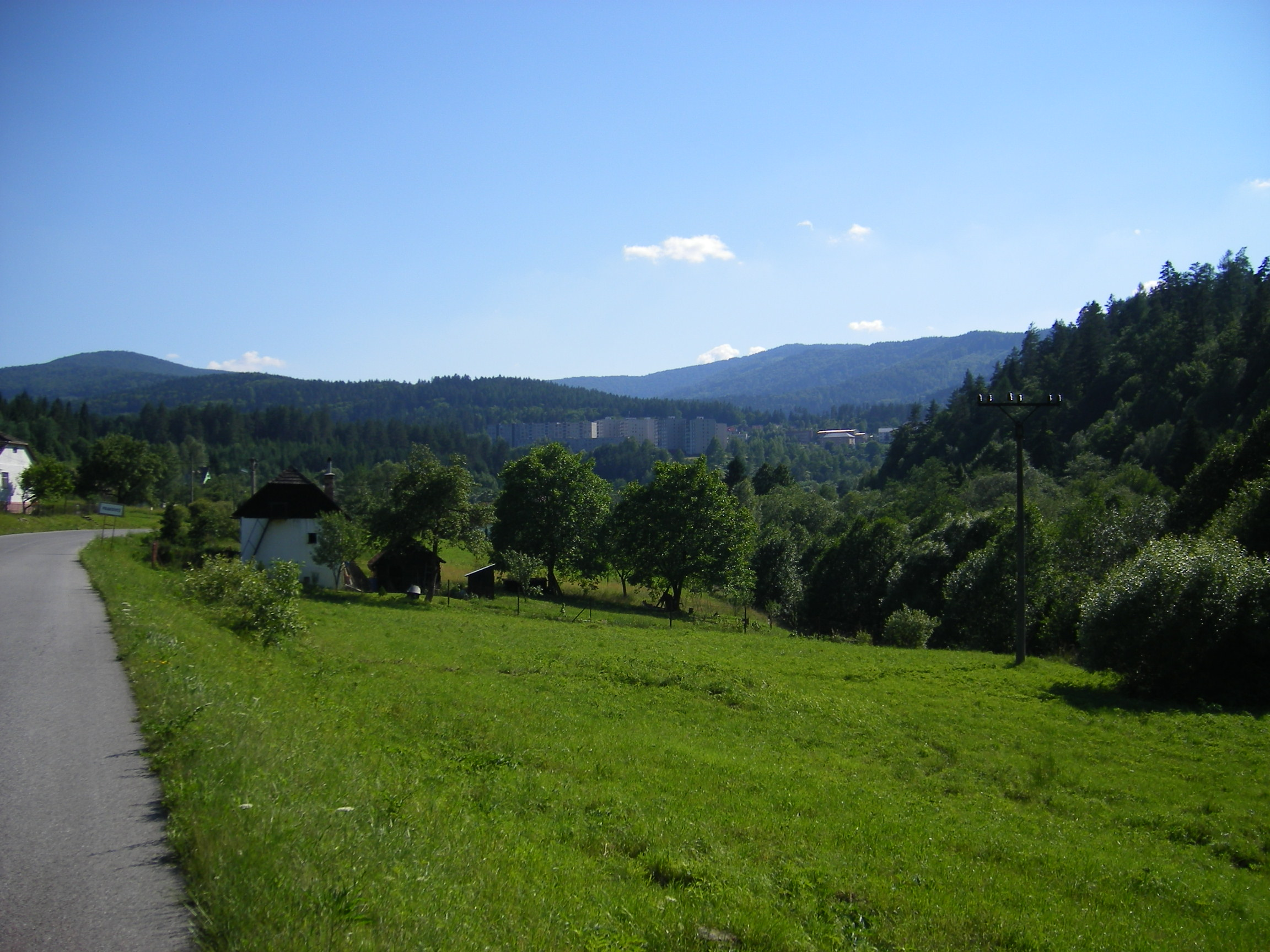 Prakovce (okres Gelnica)